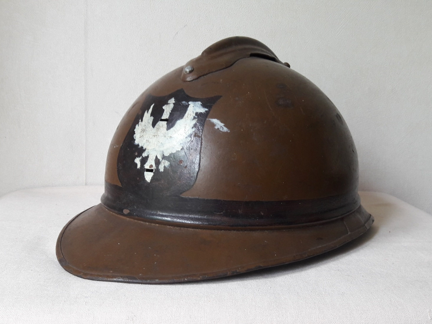 Hełm należał do Stefana Kosseckiego (1889-1940), żołnierza I Korpusu, dowódcy 18 DP w kampanii wrześniowej, mianowanego pośmiertnie generałem brygady w roku 1964 przez Naczelnego Wodza na Uchodźctwie gen. br. Władysława Andersa